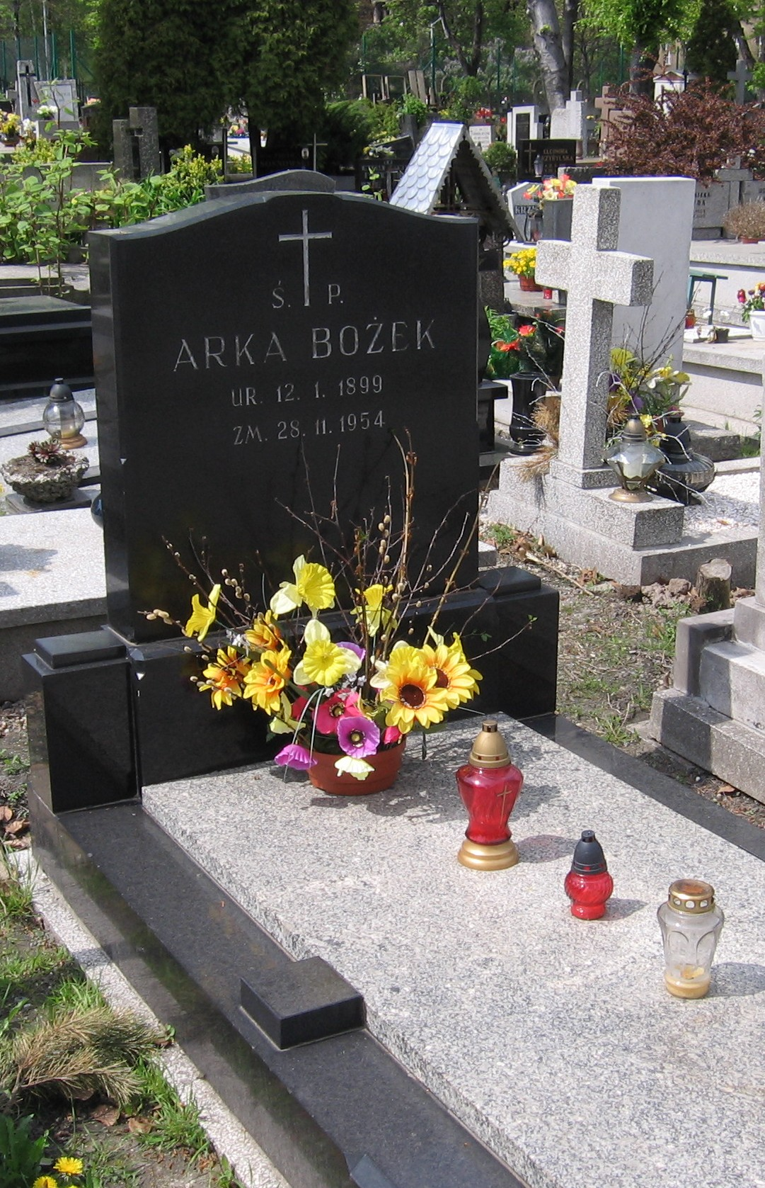 Grób Arka Bożka na cmentarzu w Katowicach przy ul. Sienkiewicza